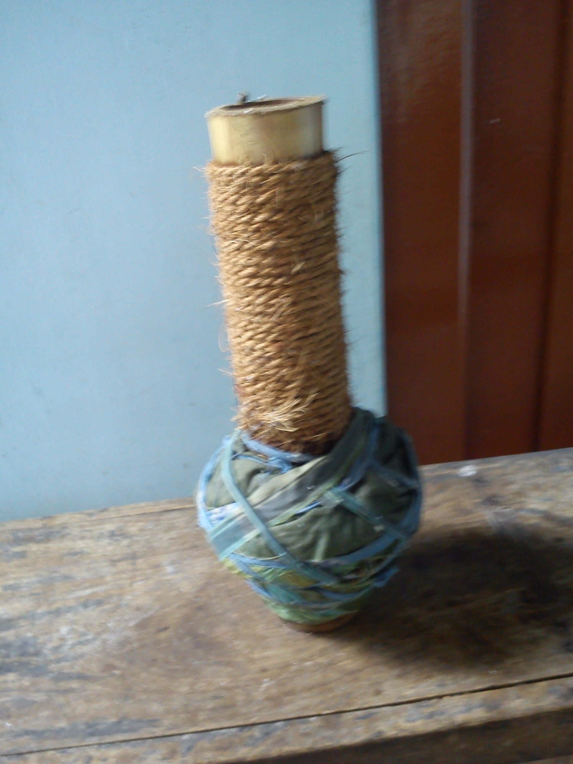 மூங்கில், சணல் கயிறு, துணி கொண்டு அமைக்கப்பட்ட பிட்டு அவிக்கும் பிட்டுக் குழல்.